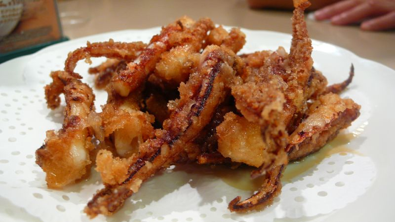 Karaage of squid legsSquid